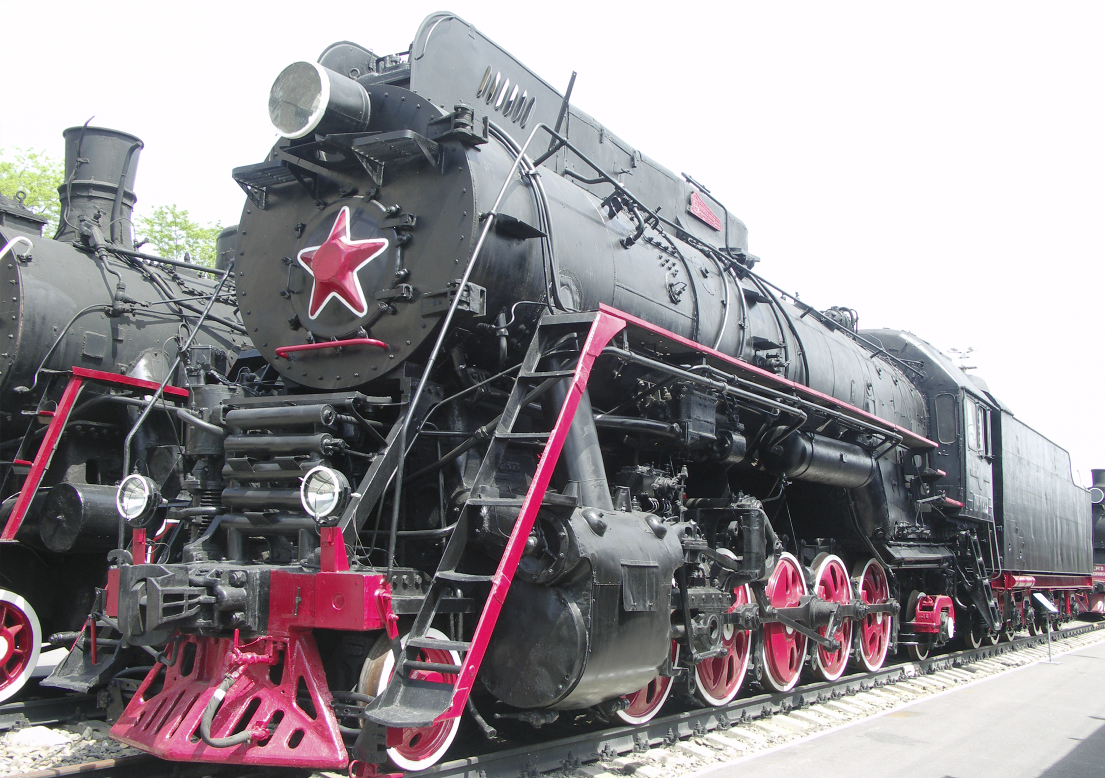 Паровоз построен в 1956 году Ворошиловградским паровозостроительным заводом